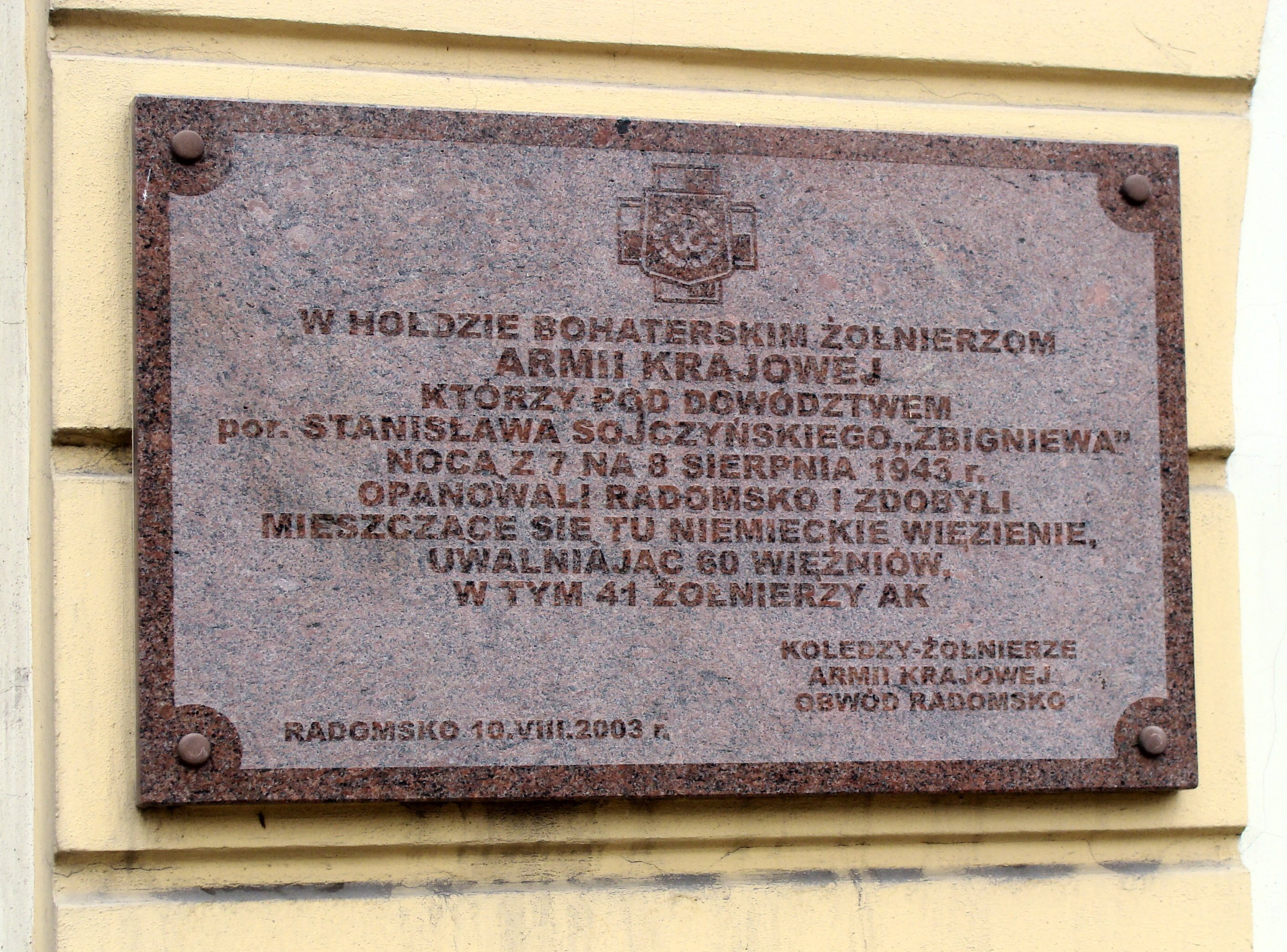 Tablica upamiętniająca opanowanie Radomska i uwolnienie więźniów z hitlerowskiego więzienia